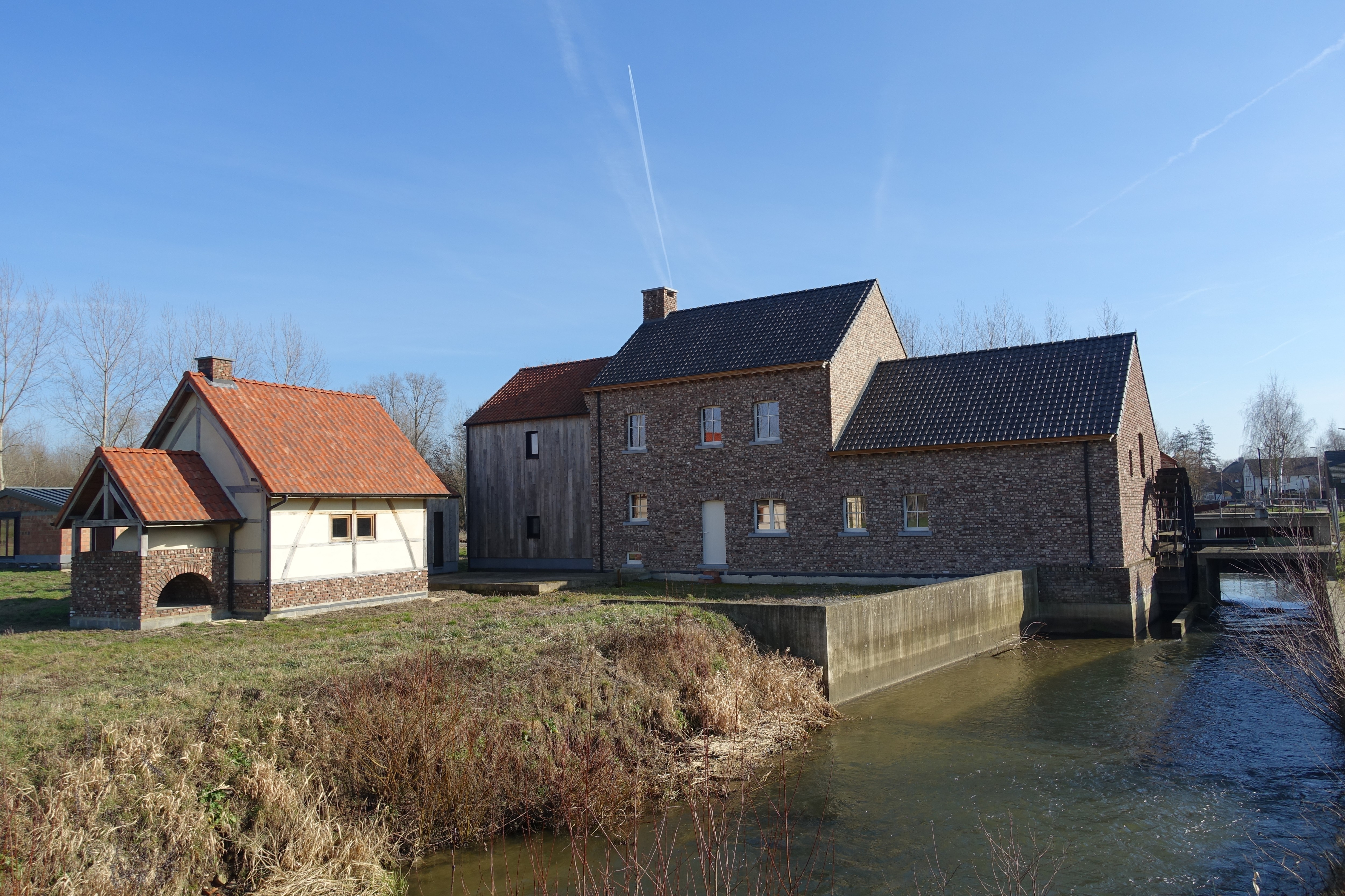 Nieuwen Meulen watermolen op de Nieuwe Herk in Terkoest, Alken, voormalige graanmolen van het onderslagtype, maalvaardig. Huidige gebouwen van rond 1845. Beschermd als monument